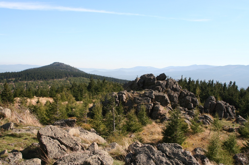 Wysoki Kamień (Góry Izerskie)